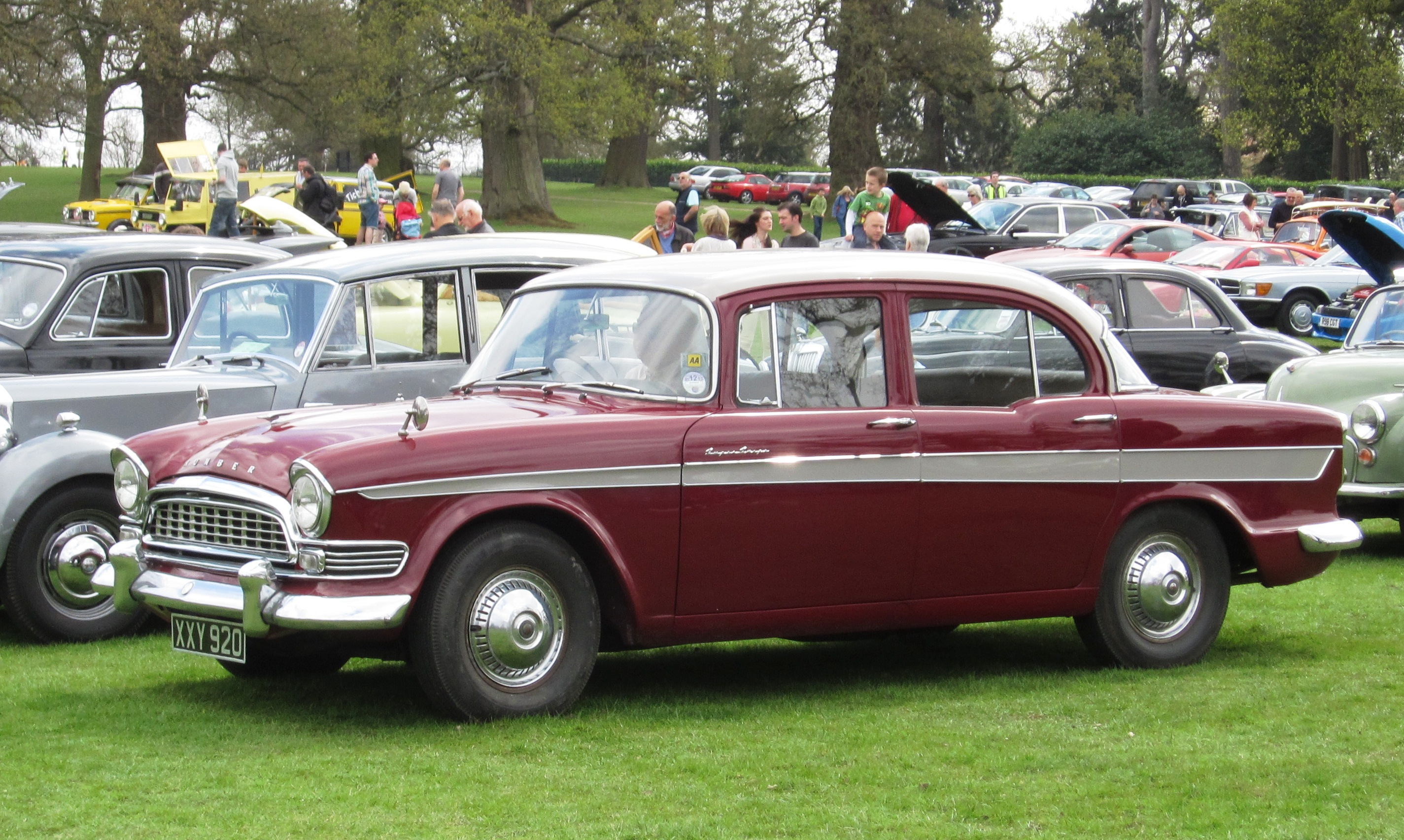 Humber Super Snipe Series II devient rouge